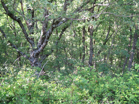 Forest in La Acebeda (Madrid)